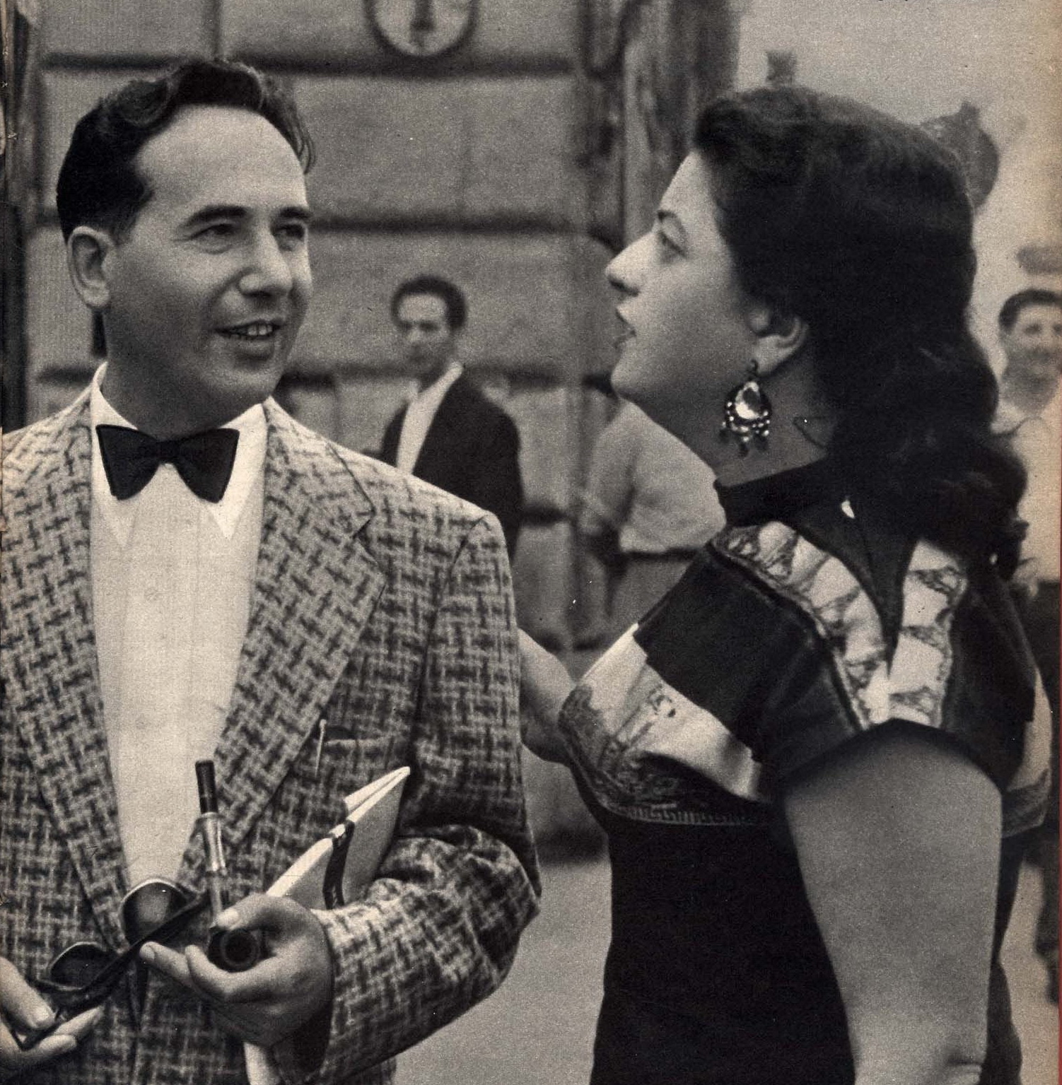 writer Yehiel Dinur (Ka-Tsetnik 135633) and his wife in Rome